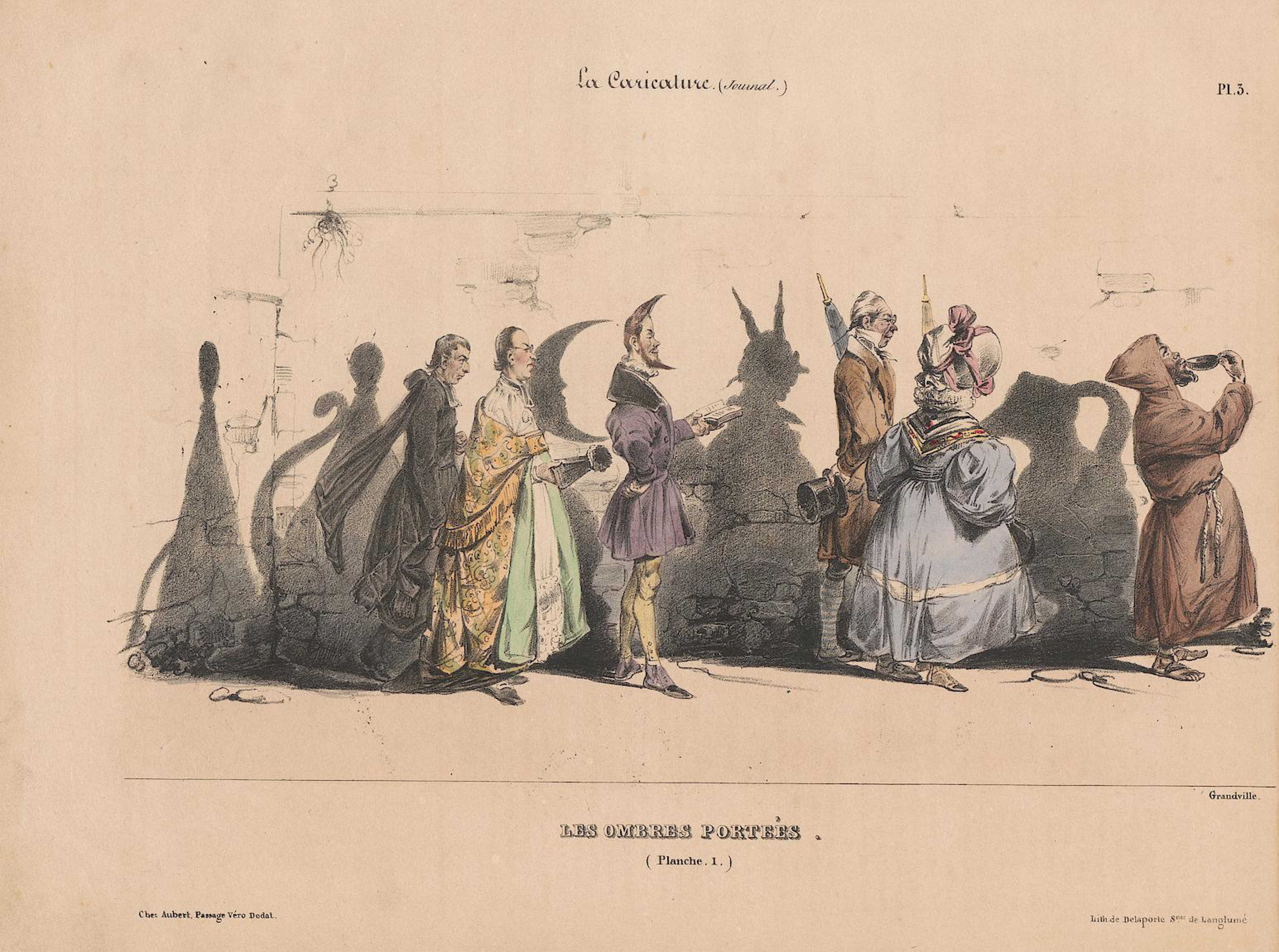 Lithographie dans La Caricature.